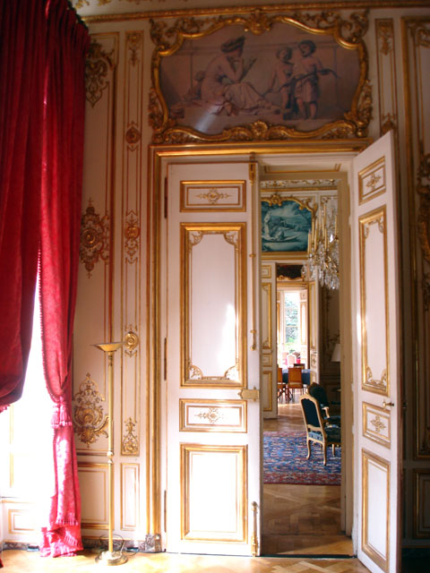 Les salons de l'Hôtel de Matignon